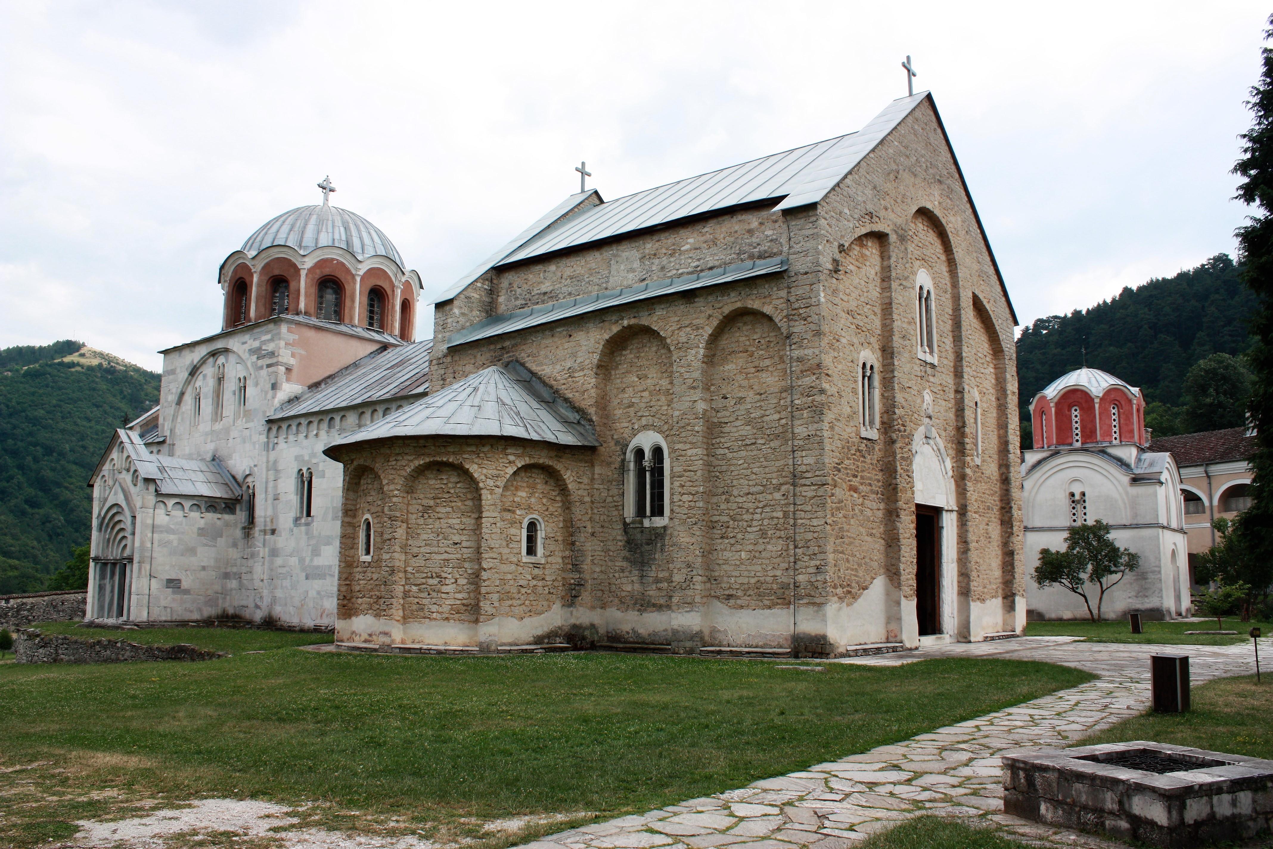 Kirken Guds mor. I bakgrunnen Kongens kirke.